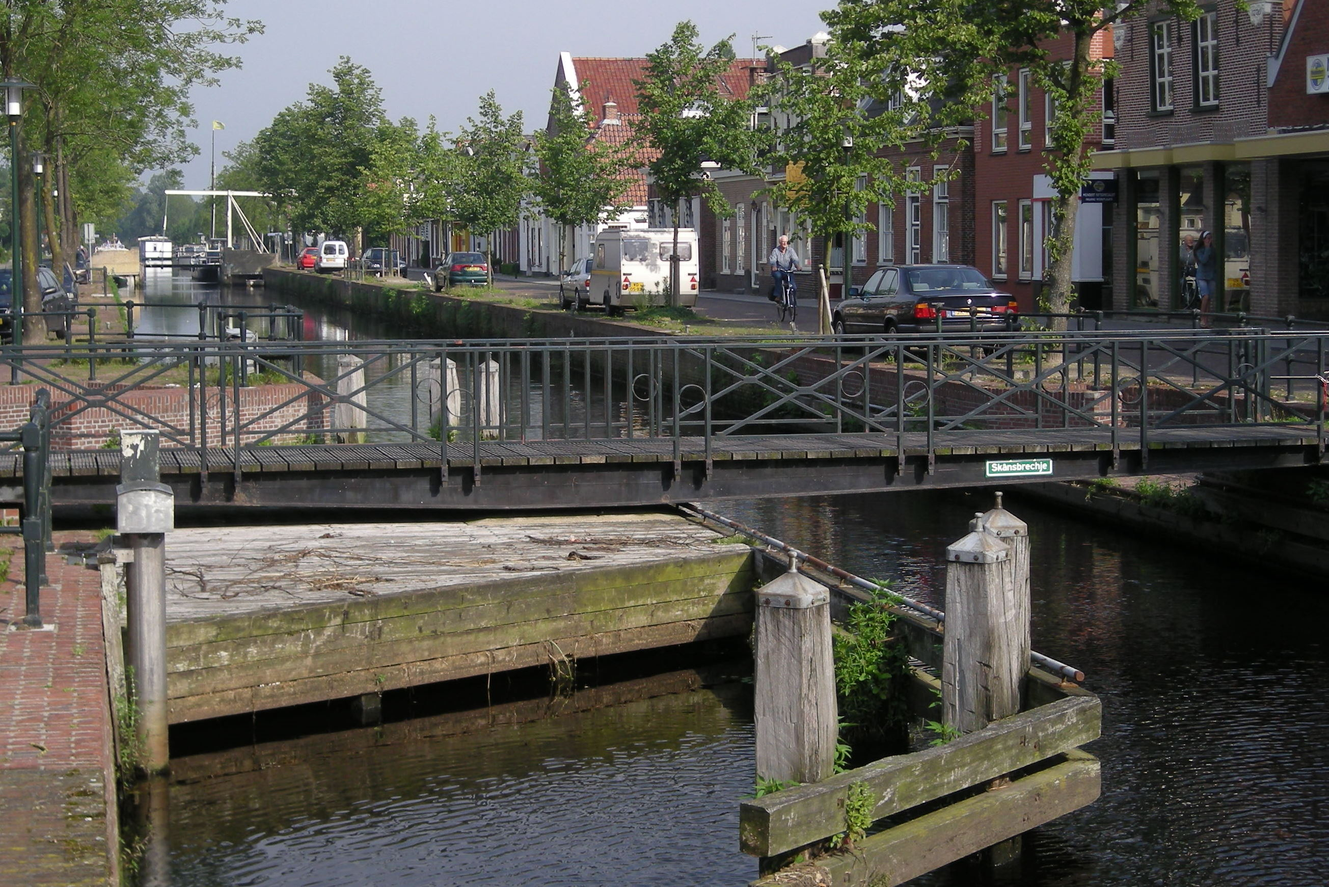 Gorredijk